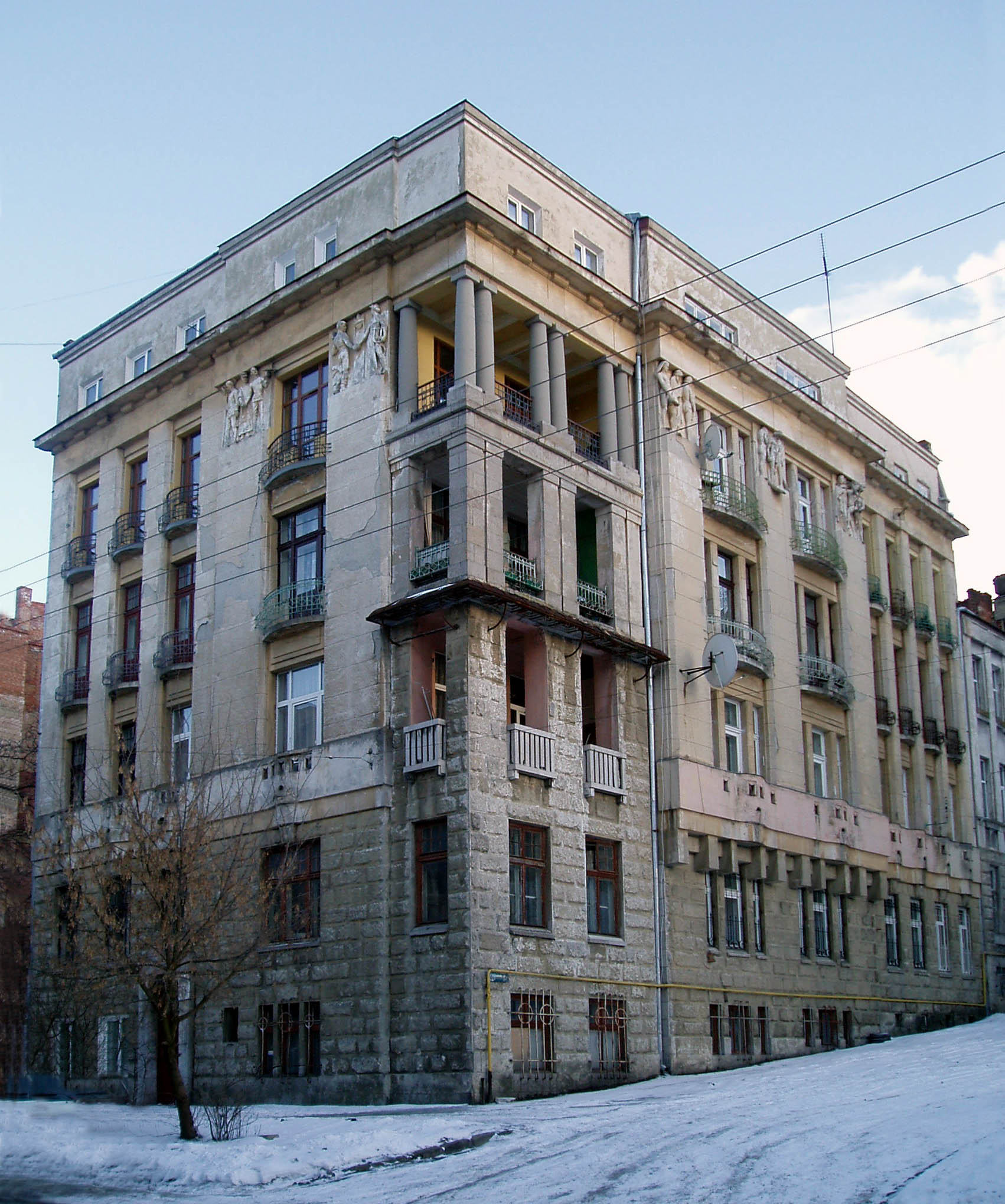 Житловий будинок на вулиці Коциловського, 15 у Львові. Архітектор Генрик Заремба (1883 - після 1939) і Юліан Пінкерфельд (1872 - після 1932), скульптор Тадеуш Блотницький (1858-1928).